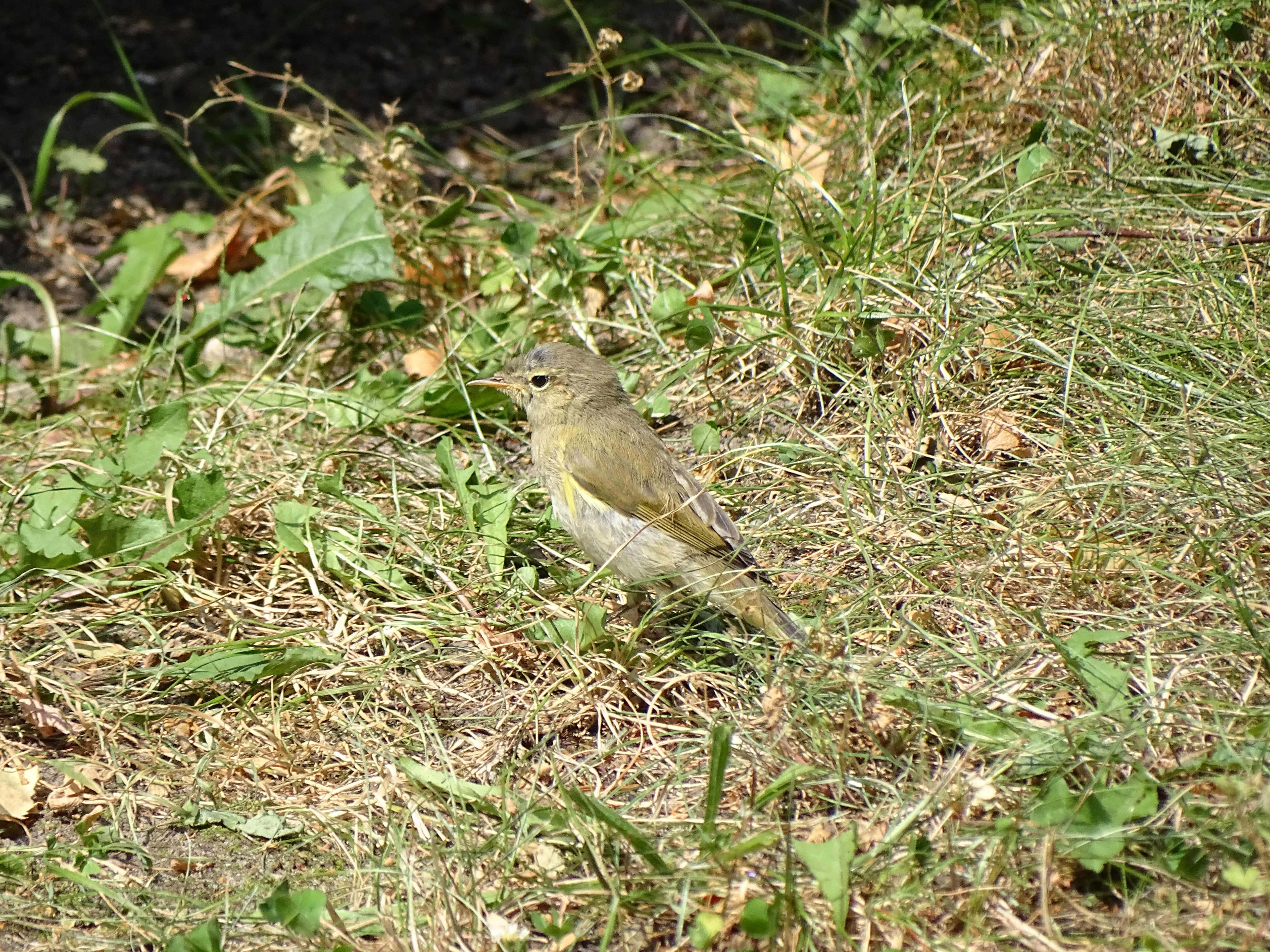 Zilpzalp Phylloscopus collybita in Berlin